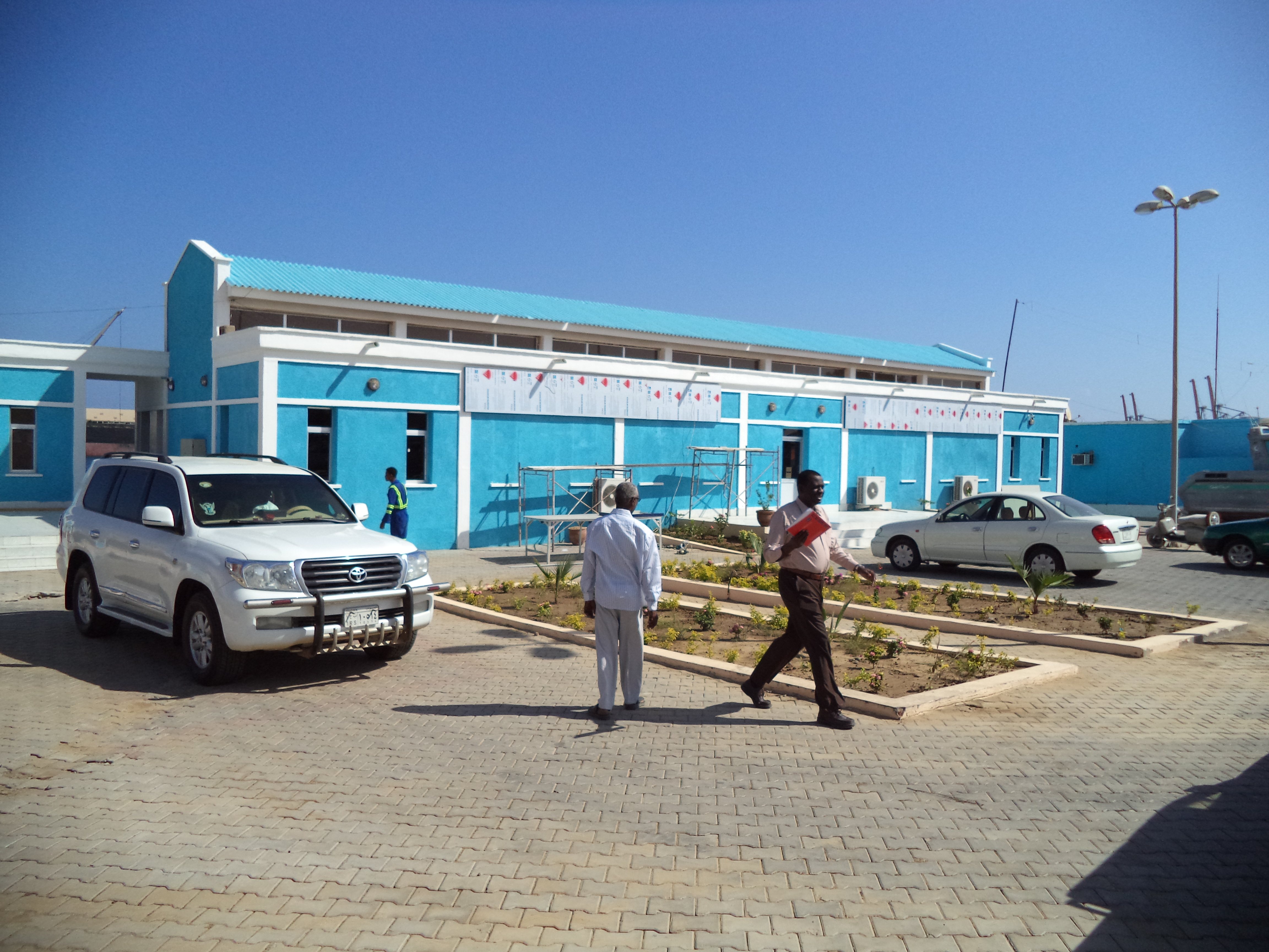 مدخل بورتسودان اكواريوم